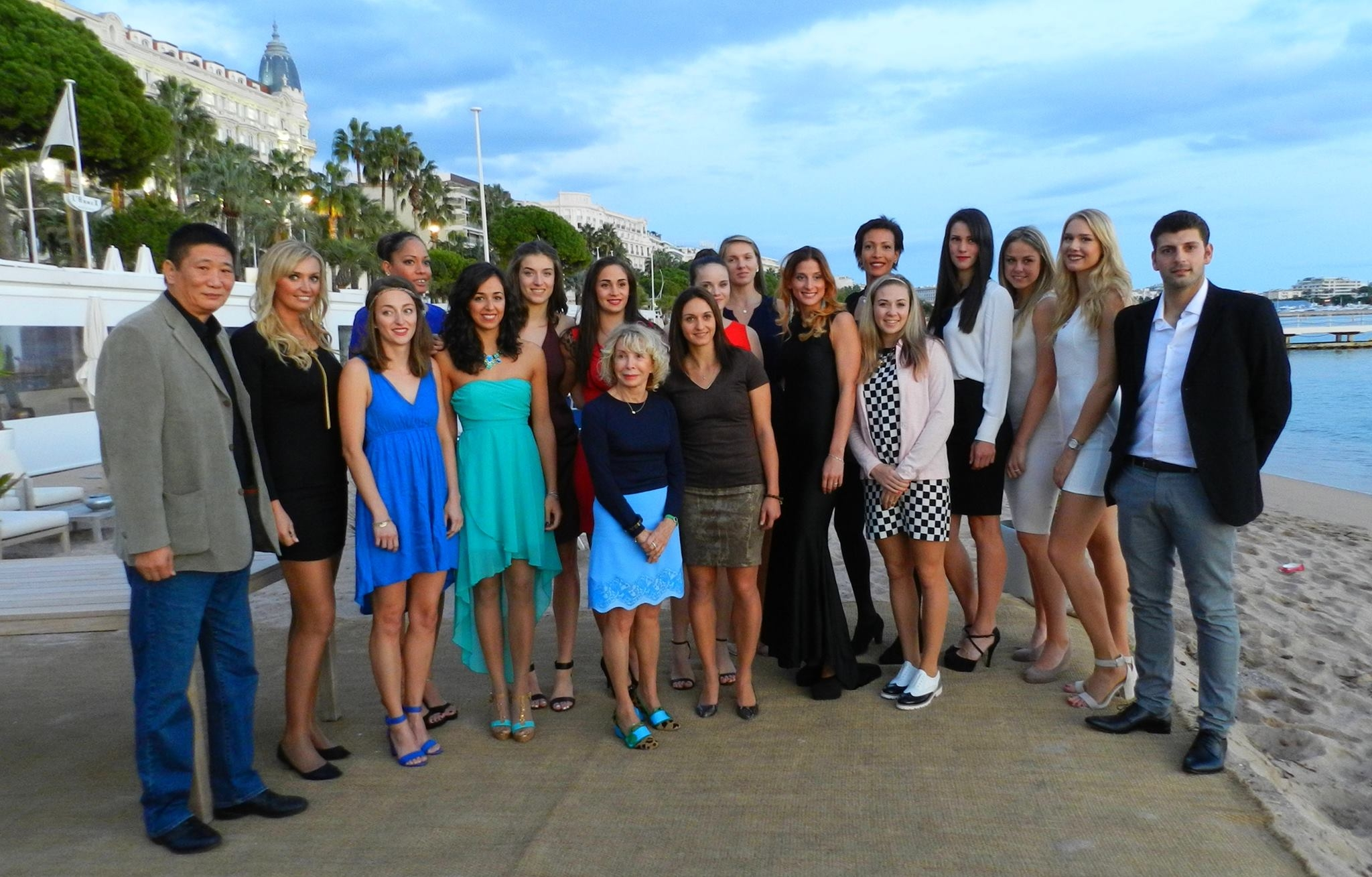 présentation de l'équipe